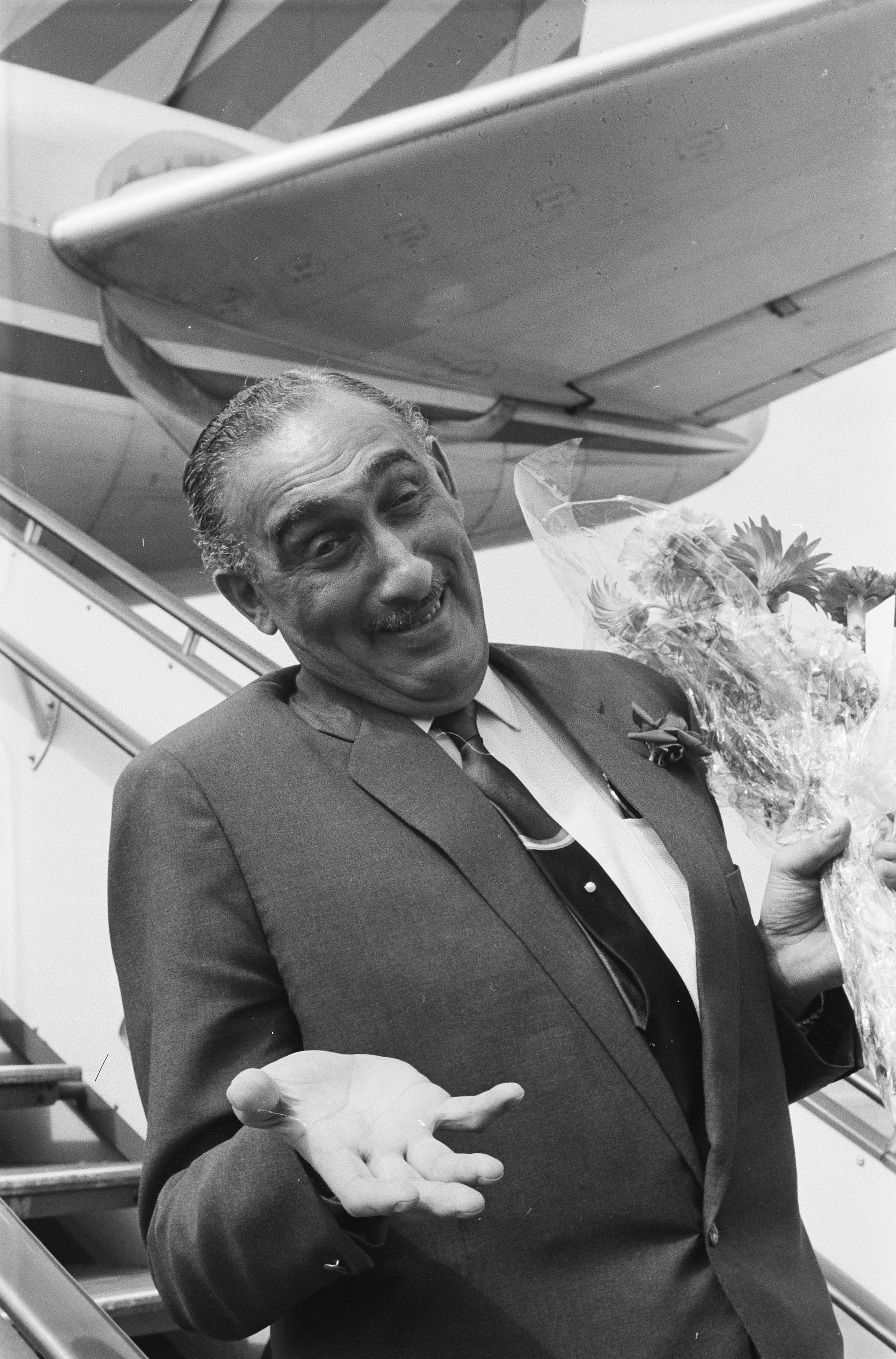 Collectie / Archief : Fotocollectie Anefo Reportage / Serie : [ onbekend ] Beschrijving : Max Tailleur naar Nieuw-Guinea Datum : 1 augustus 1962 Locatie : Nieuw-Guinea Persoonsnaam : Tailleur, Max Fotograaf : Pot, Harry / Anefo Auteursrechthebbende : Nationaal Archief Materiaalsoort : Negatief (zwart/wit) Nummer archiefinventaris : bekijk toegang 2.24.01.05 Bestanddeelnummer : 914-1701